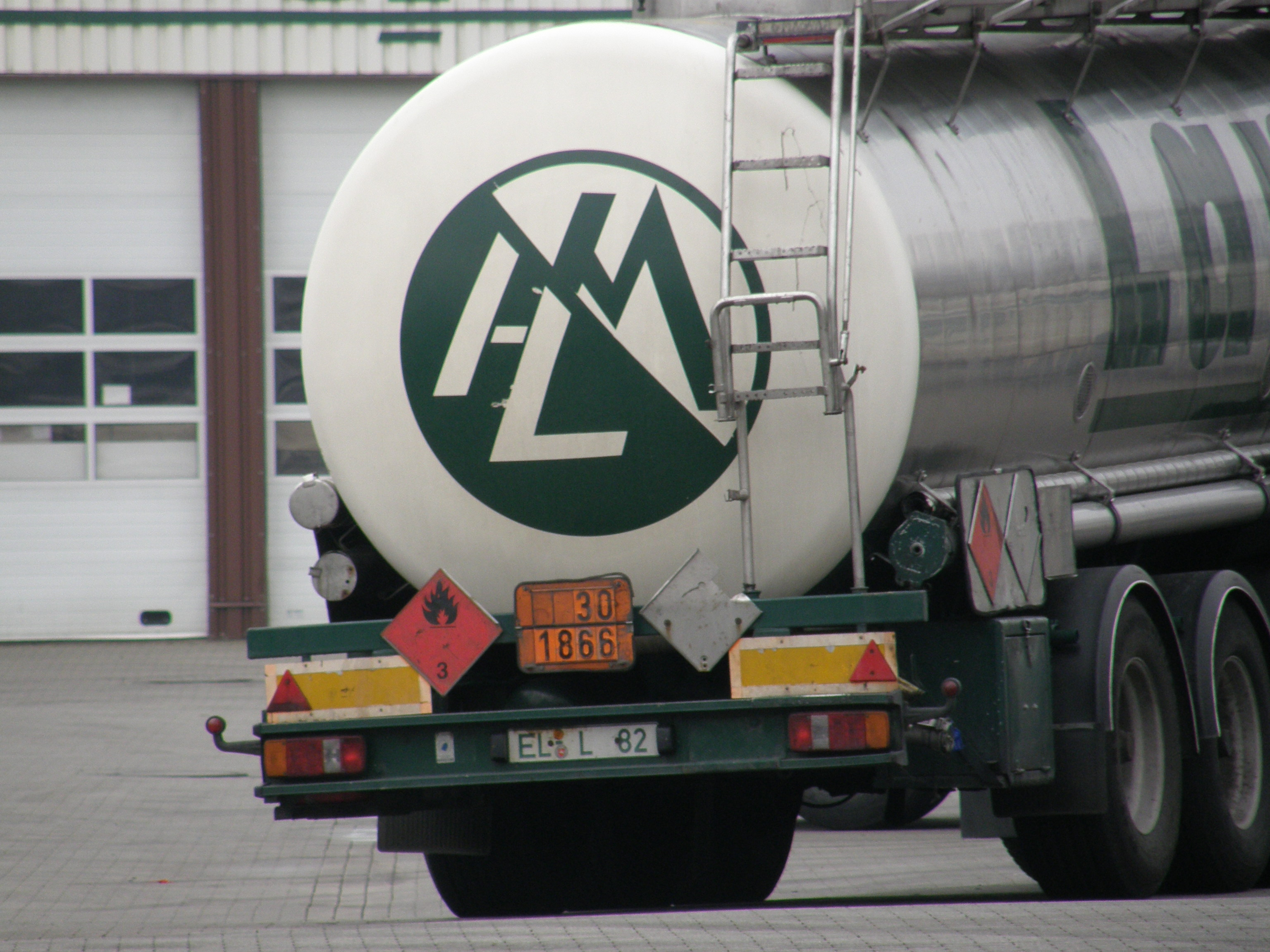 Tankauflieger mit ADR Tafel und Zettel